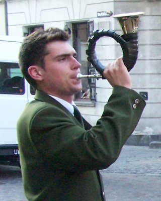 Trębacz w odświętnym mundurze myśliwskim gra fanfarę na sygnałówce na cześć nowożeńców. Ślub odbył się w Kościele Ducha Świętego (Warszawa, ulica Długa)